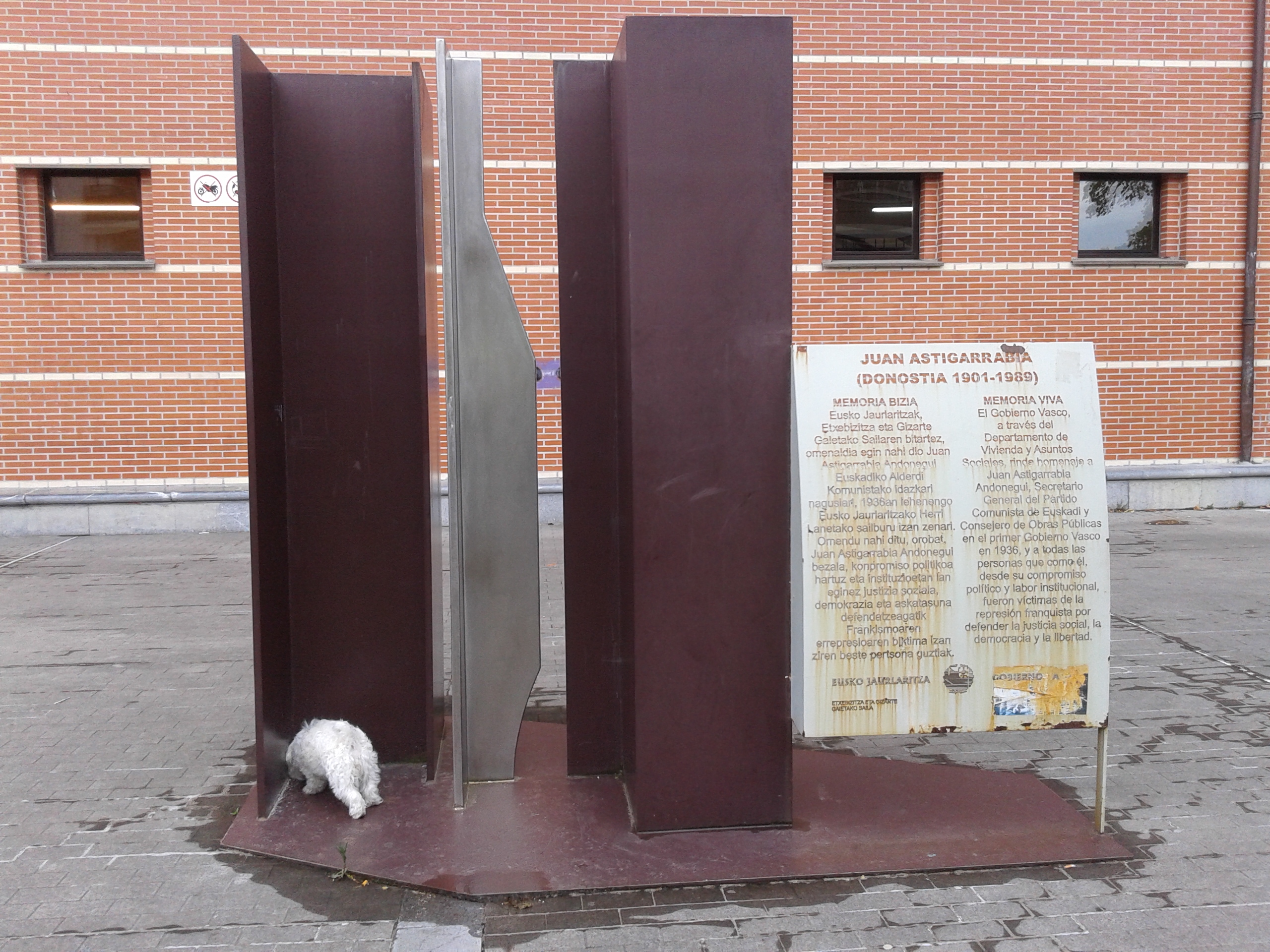 Antigua auzoko kulturetxearen aurrean jarritako oroigarria.